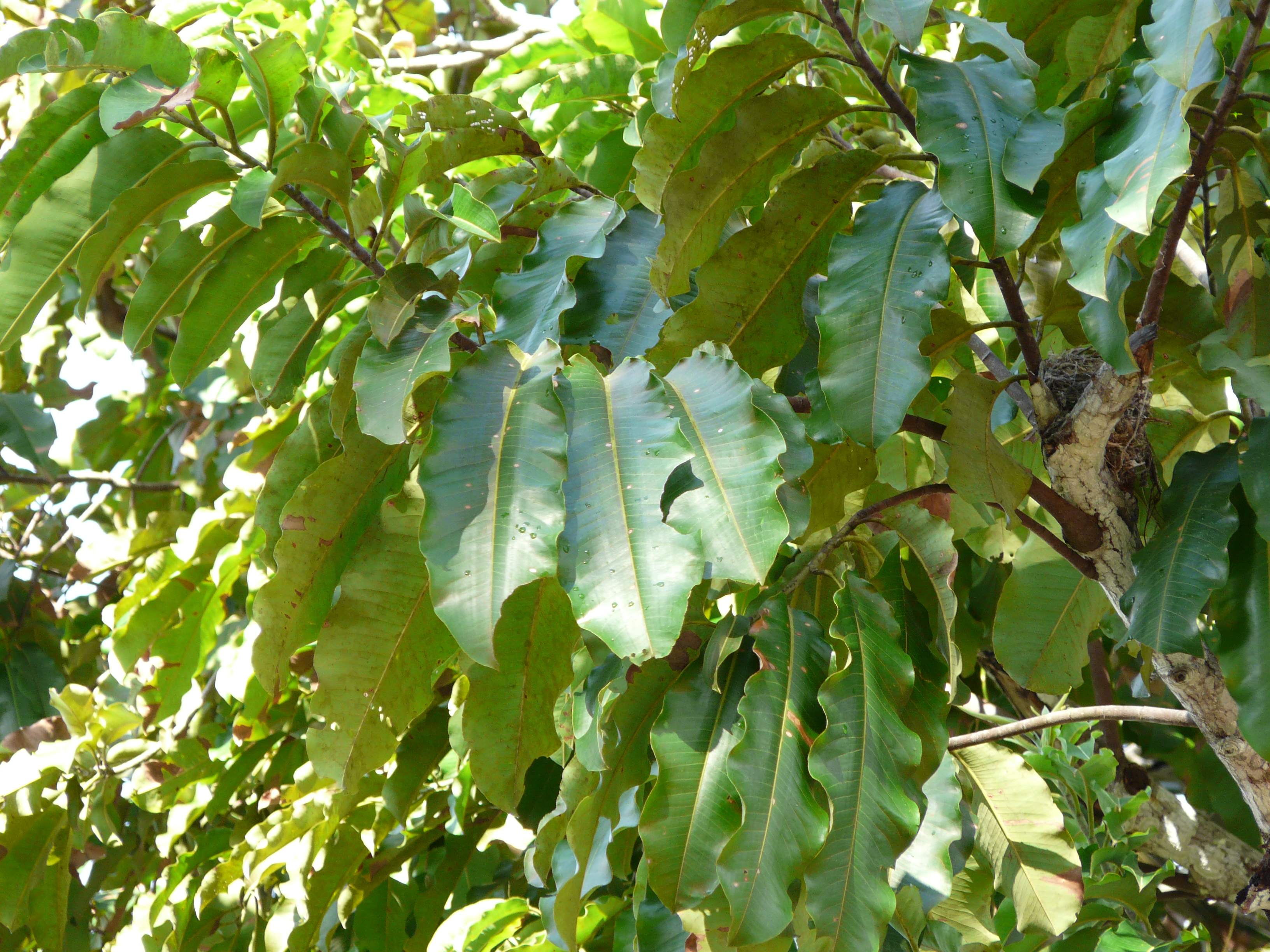 Parapähklipuu (Bertholletia excelsa) lehestik. Rio Negro, Amasoonia, mai algus.